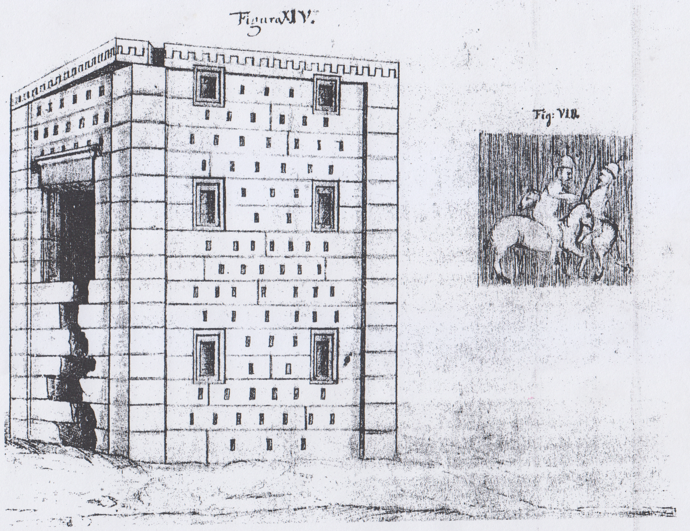 طراحی خطی کعبه زرتشت (اسلون 5232/52)